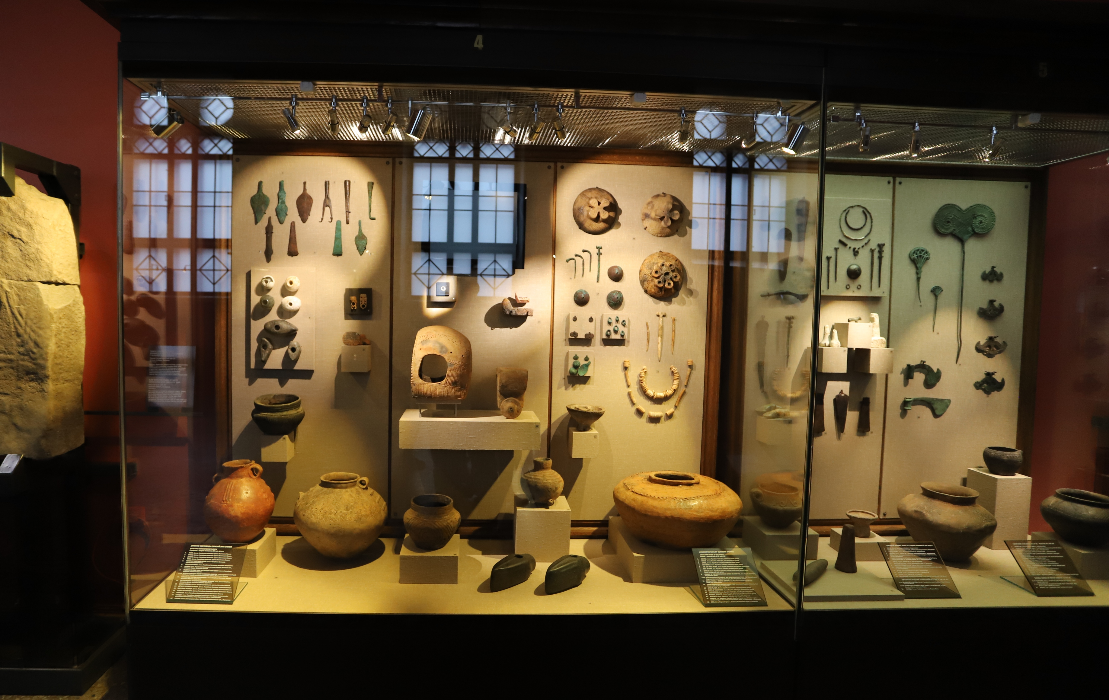 "Государственный Исторический музей" "Древние скотоводы Евразийских степей. Культуры катакомбного круга"